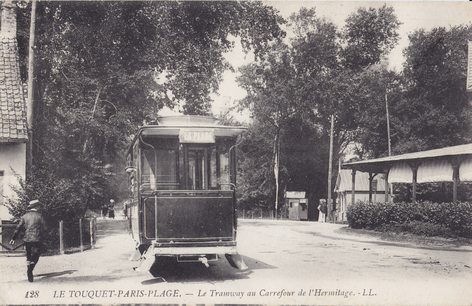 Carte postale ancienne éditée par : LE TOUQUET-PARIS-PLAGE - Le Tramway au Carrefour de l'Hermitage